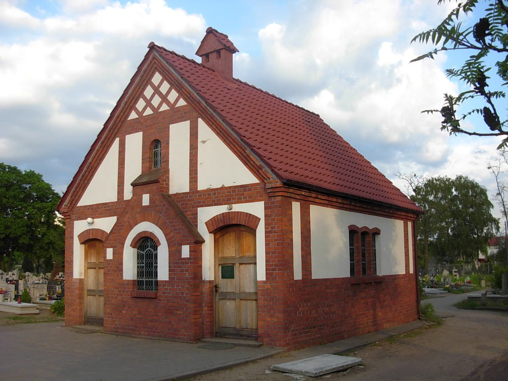 Cmentarz komunalny, Bydgoszcz ul Kcyńska